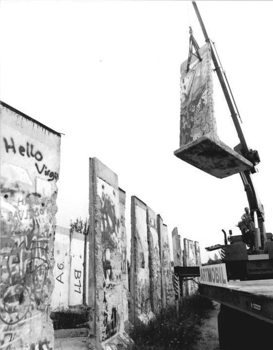 ADN-Karl-Heinz Schindler-29.8.90-Berlin: Ein Stück Berliner Mauer für die Kennedys- Das Segment der Berliner Mauer, ordentlich mit der Nummer A 8 katalogisiert, schwebt vom Lagerplatz der NVA bei Bernau. Es wird nach Übersee verschifft werden. Empfänger ist die Schwester des ehemaligen US-Präsidenten John F. Kennedy, Jean Smith-Kennedy. Ihr wird das 2,6 Tonnen schwere und 3,60 Meter hohe sowie 1,20 Meter breite Stück der "Berlin wall" als Spende für die John-F.-Kennedy-Bibliothek in Boston überlassen.